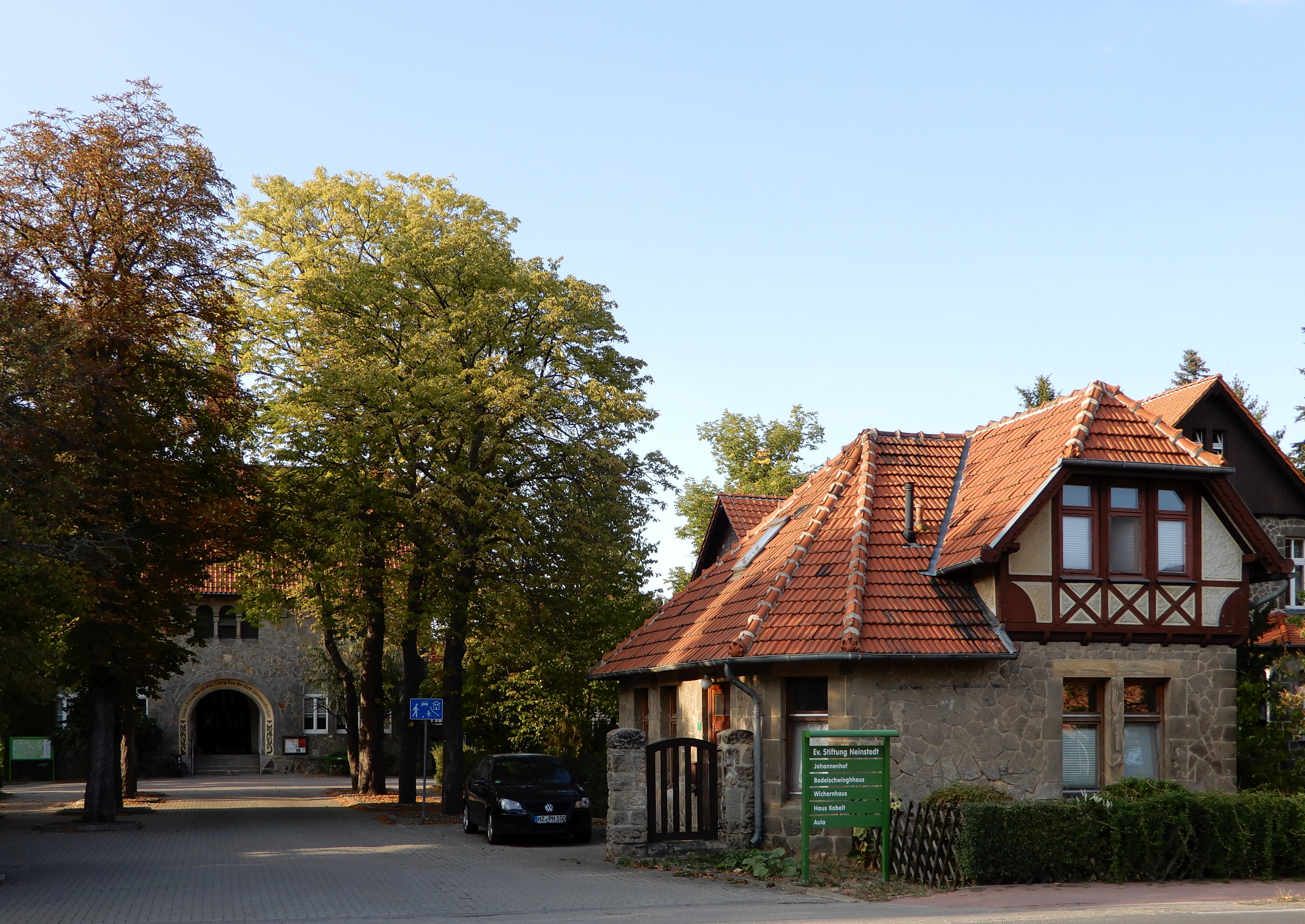 Lindenhof Suderöder Straße 3 (Neinstedt)